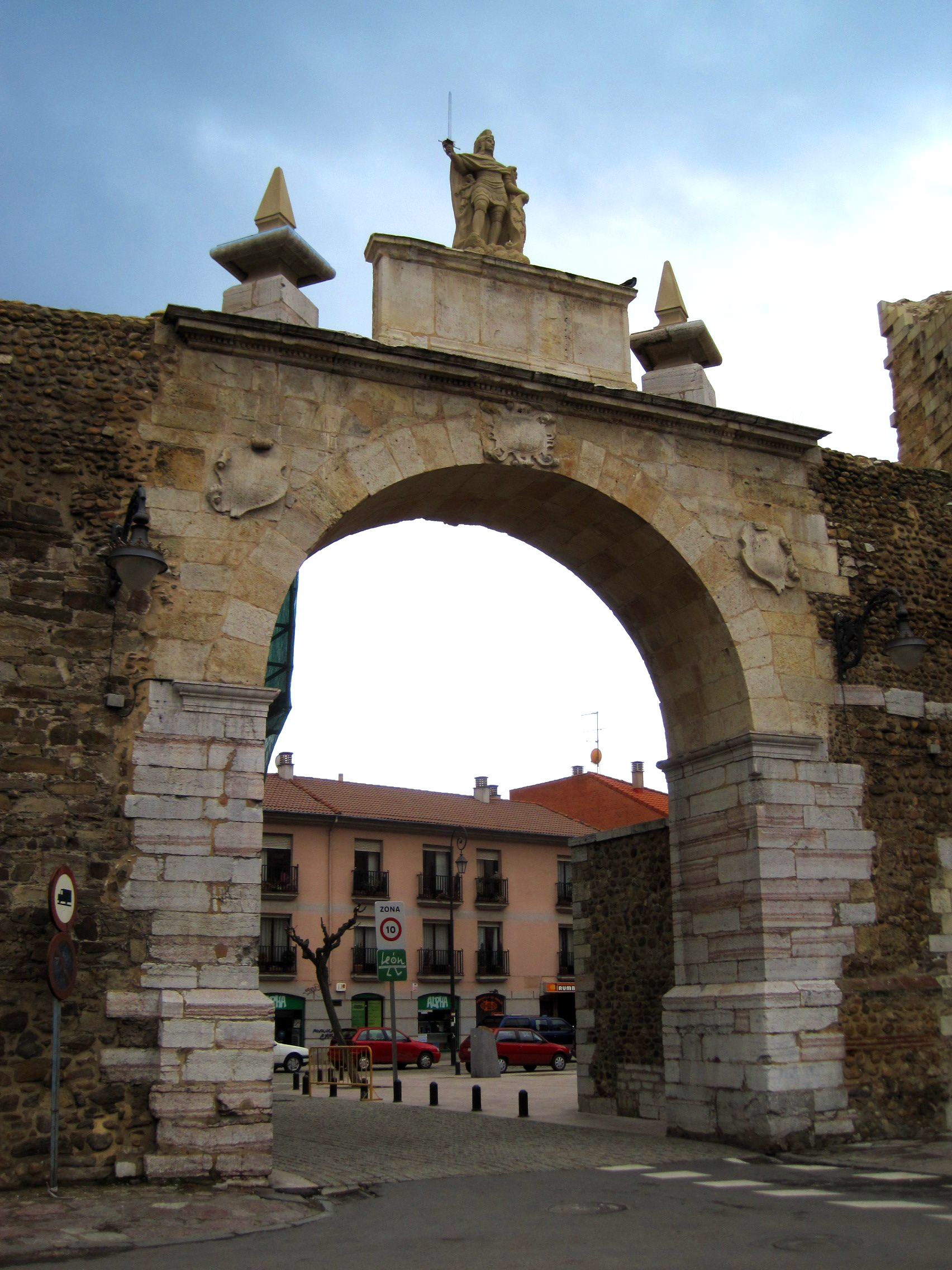 Arco de la cárcel, en la muralla de León (España).